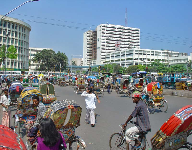 Straßenansicht im Zentrum Dhakas unweit der Universität